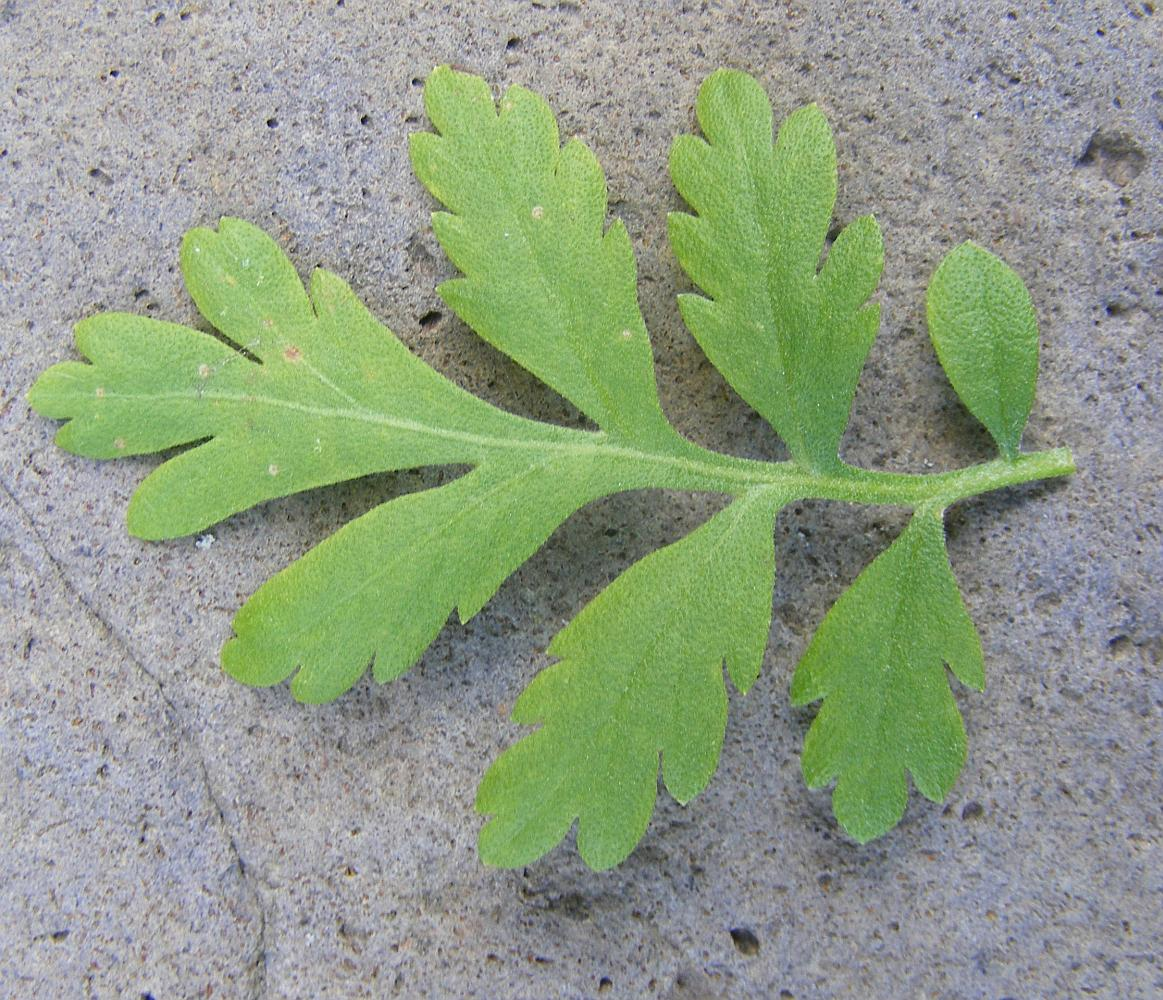 Blatt der Pflanze